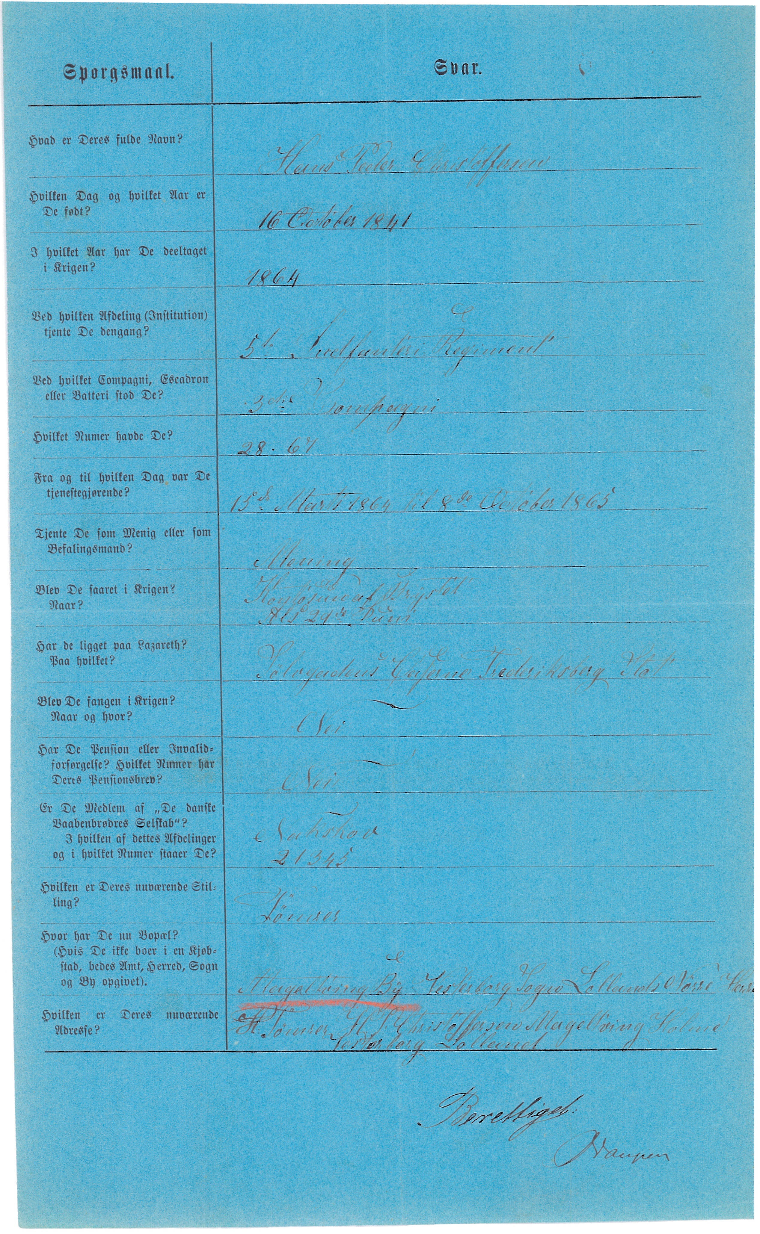 Rigsarkivet. Krigsministeriet. Ansøgning om Erindringsmedaljen for krigsdeltagelse i krigen 1864